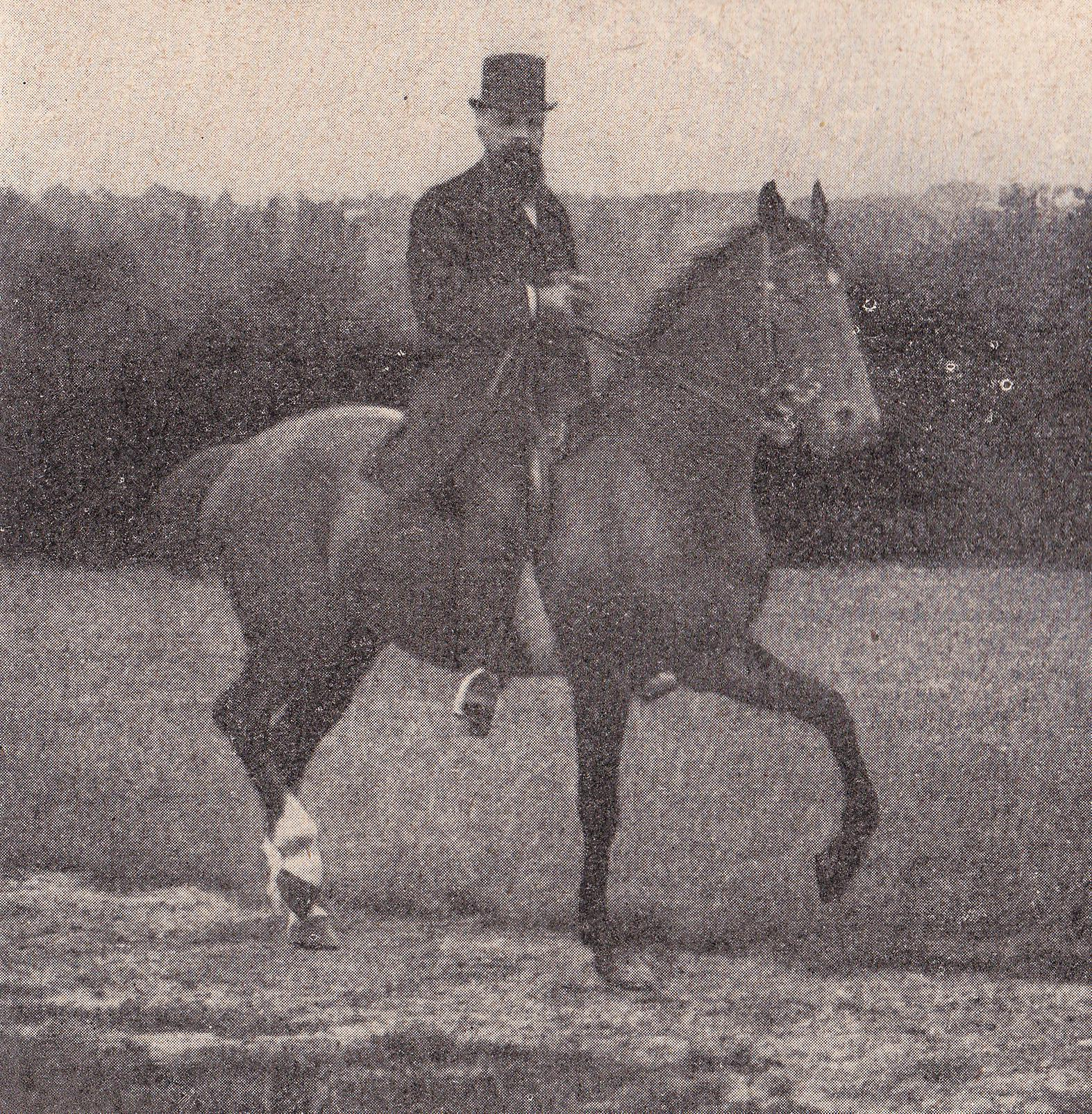 Демонстрация дрессировки, Лебон в седле. Фотография из книги 1895 года.